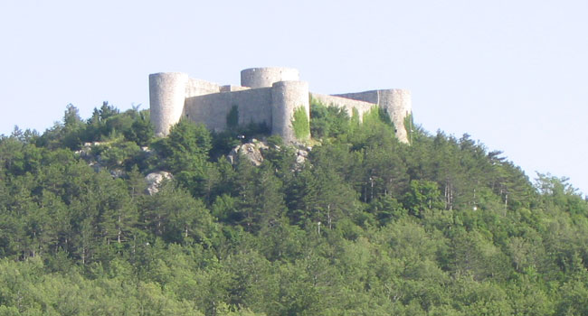 Drivenik, Croatia